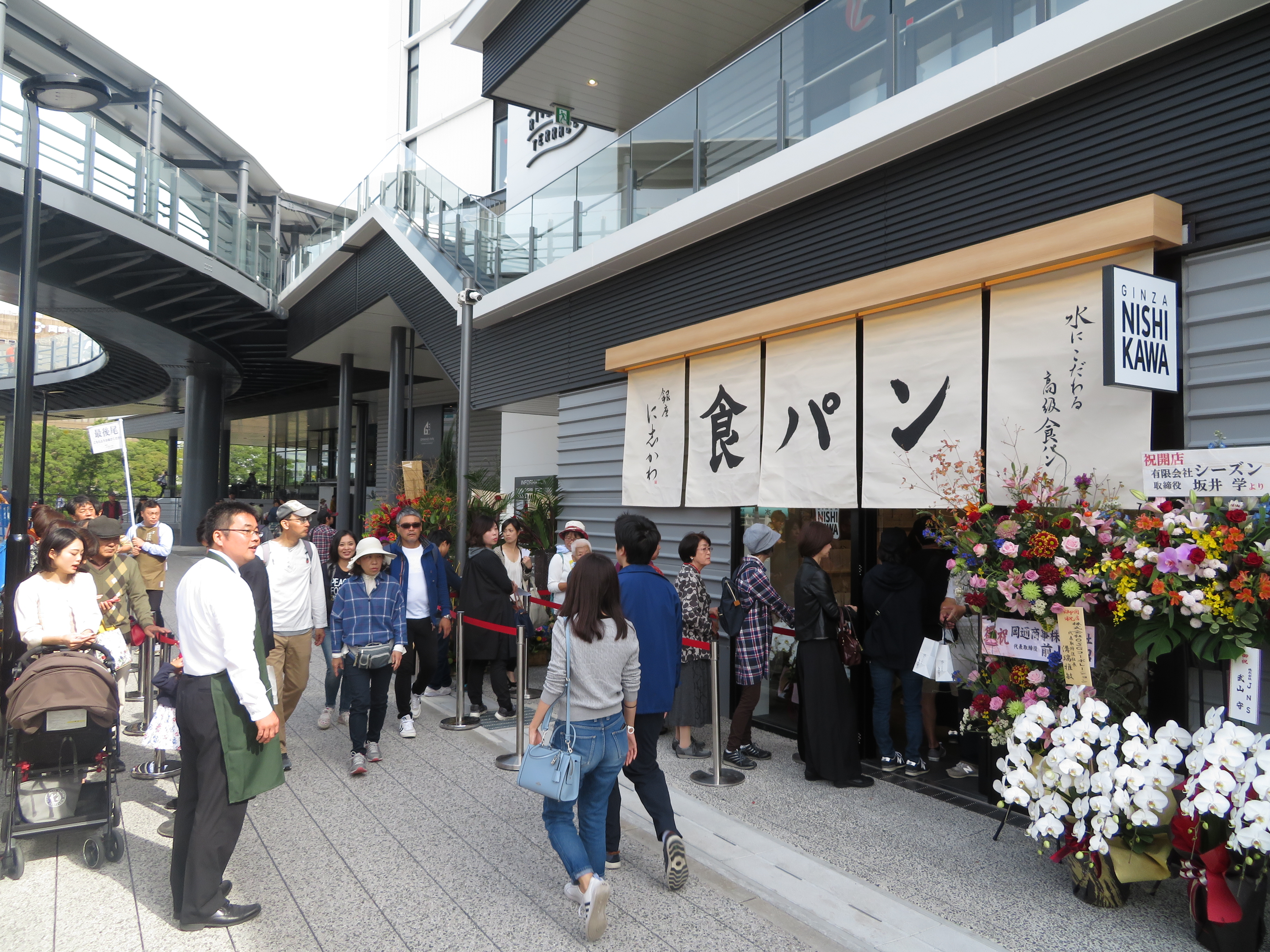 オト リバーサイドテラス（愛知県岡崎市）。